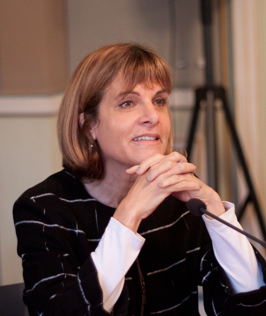 Anne Lauvergeon, le 3 février 2012